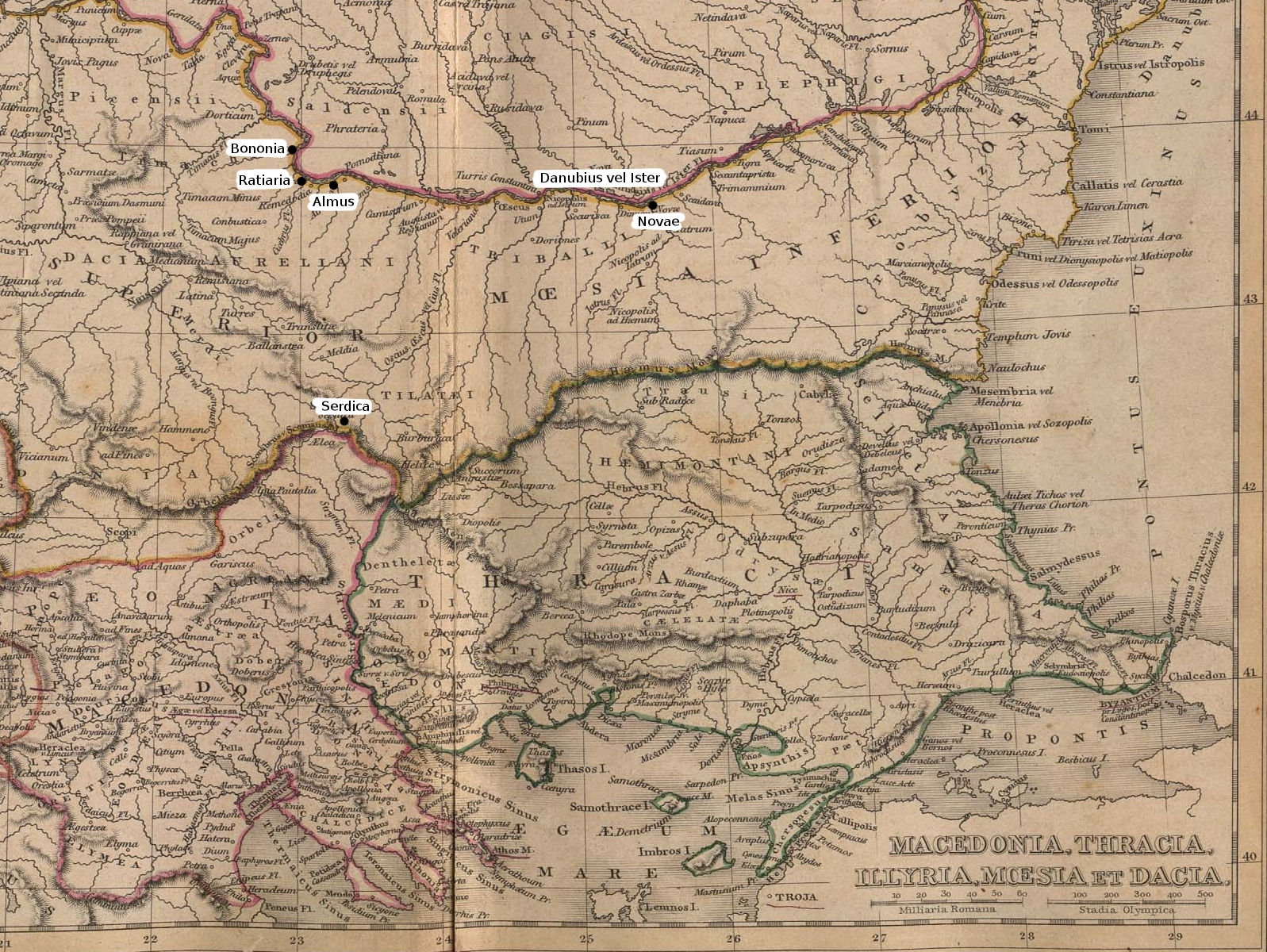 Lage der antiken Stadt Ritiaria